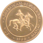 1999-cu ildə “Kitabi-Dədə Qorqud” dastanının 1300 illiyinə həsr olunmuş 100 Manat dəyərində qızıl xatirə sikkələri buraxılmışdır.